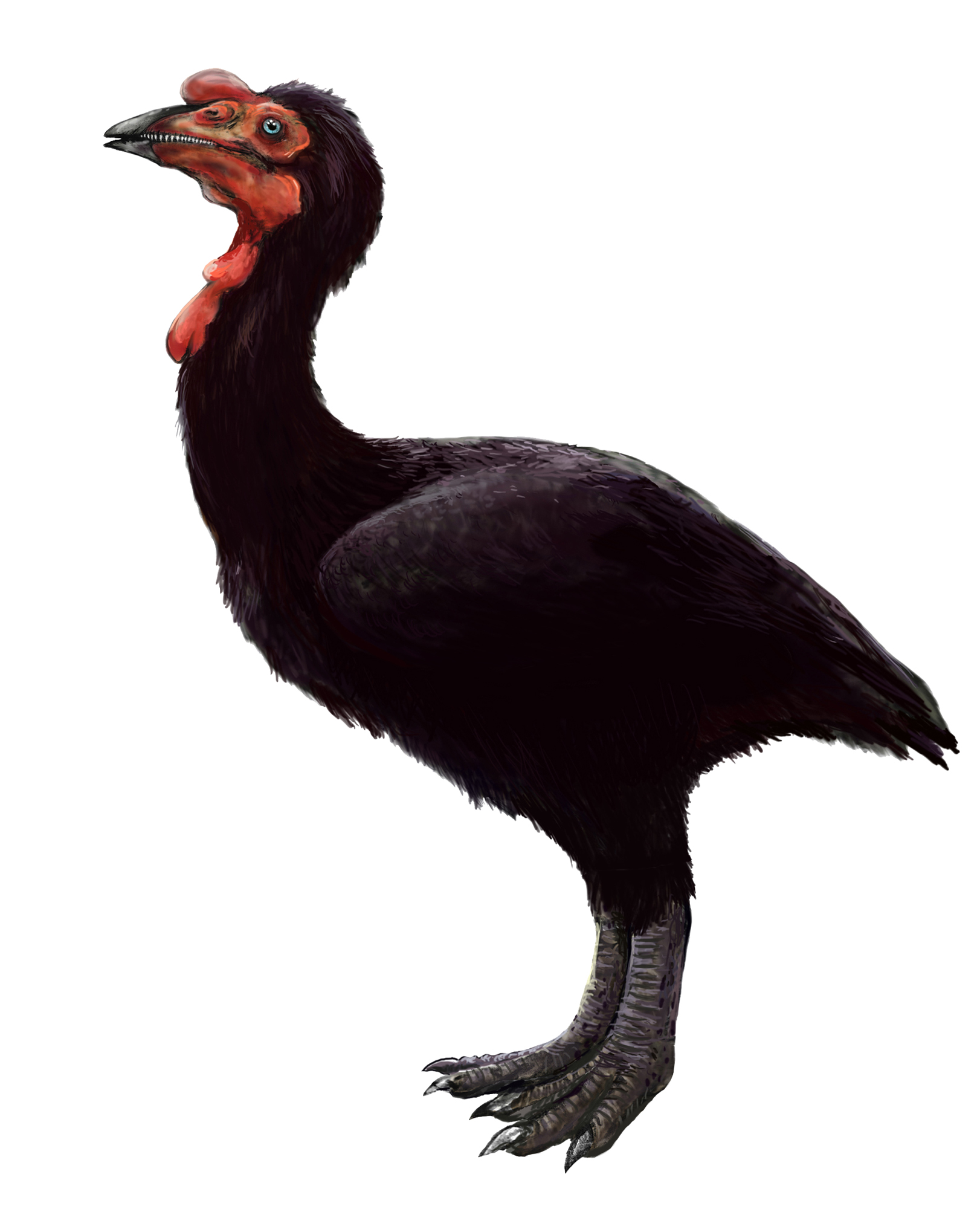 Patagopteryx deferrariisi